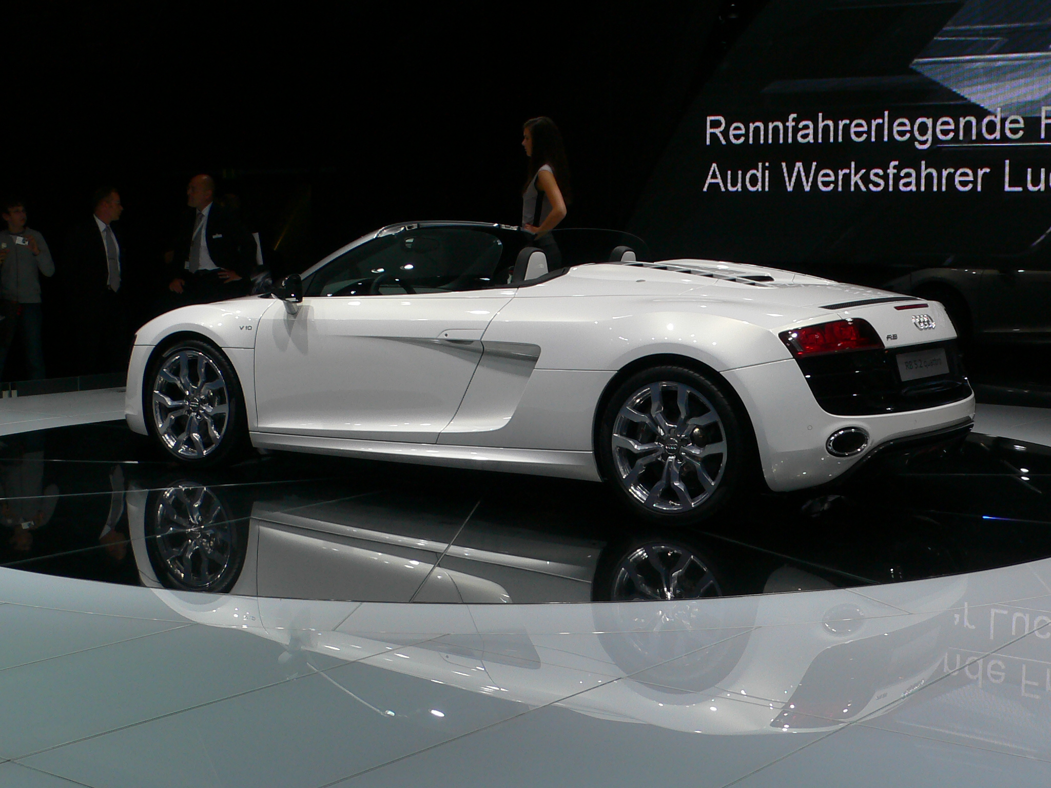 Audi R8 Spyder au Salon de l'automobile de Francfort.